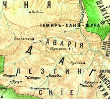 Аварское ханство (карта)